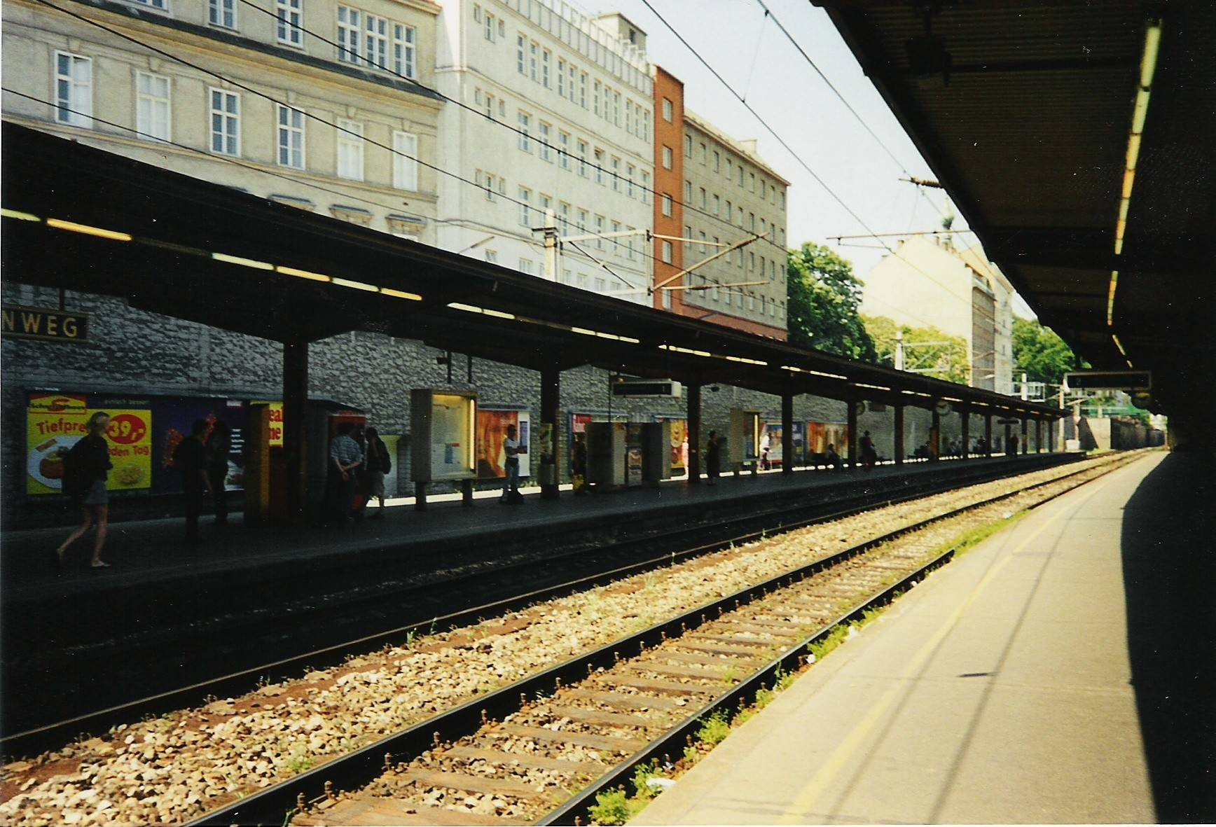 de: Haltestelle Rennweg vor Umbau en: Station Rennweg before reconstruction